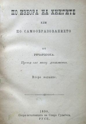 Ричардсон (1896) По избора на книгите или по самообразованието, второ издание, Русе: Скоро-печатница Спиро Гулабчевъ